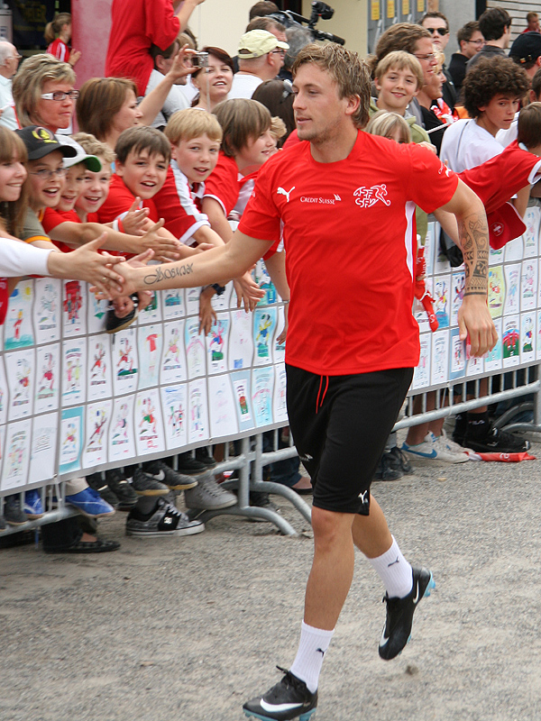 Daniel Gygax im Trainingslager der Schweizer Fussballnationalmannschaft vor der Euro 2008